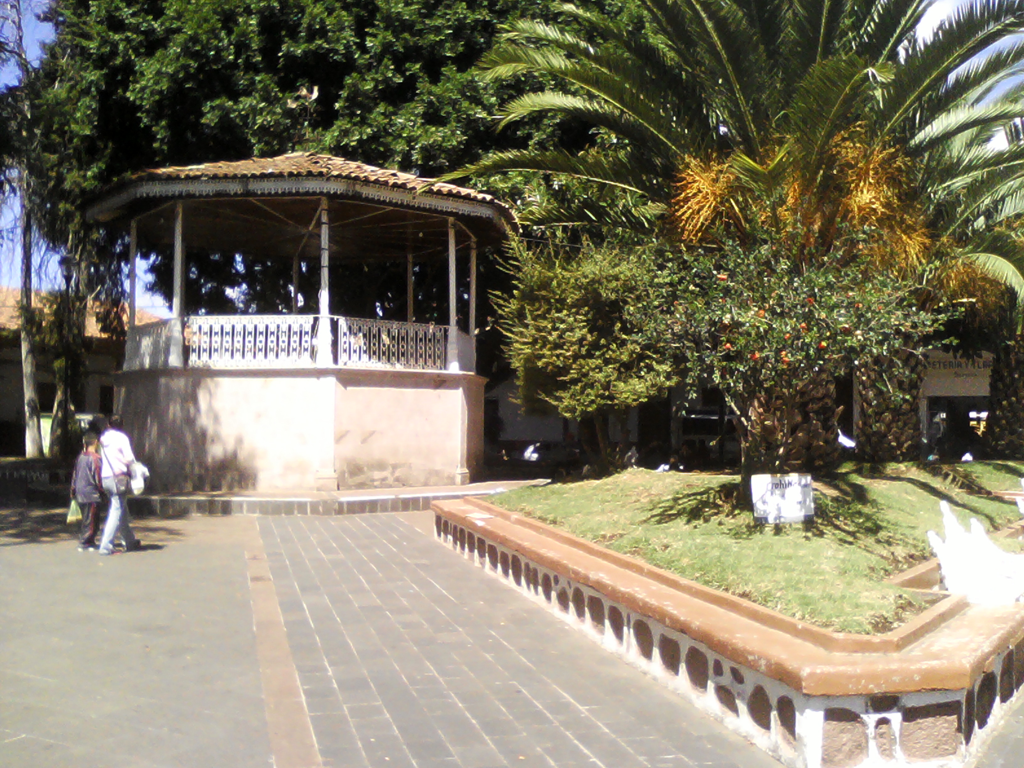 Plaza principal de Coeneo de la Libertad